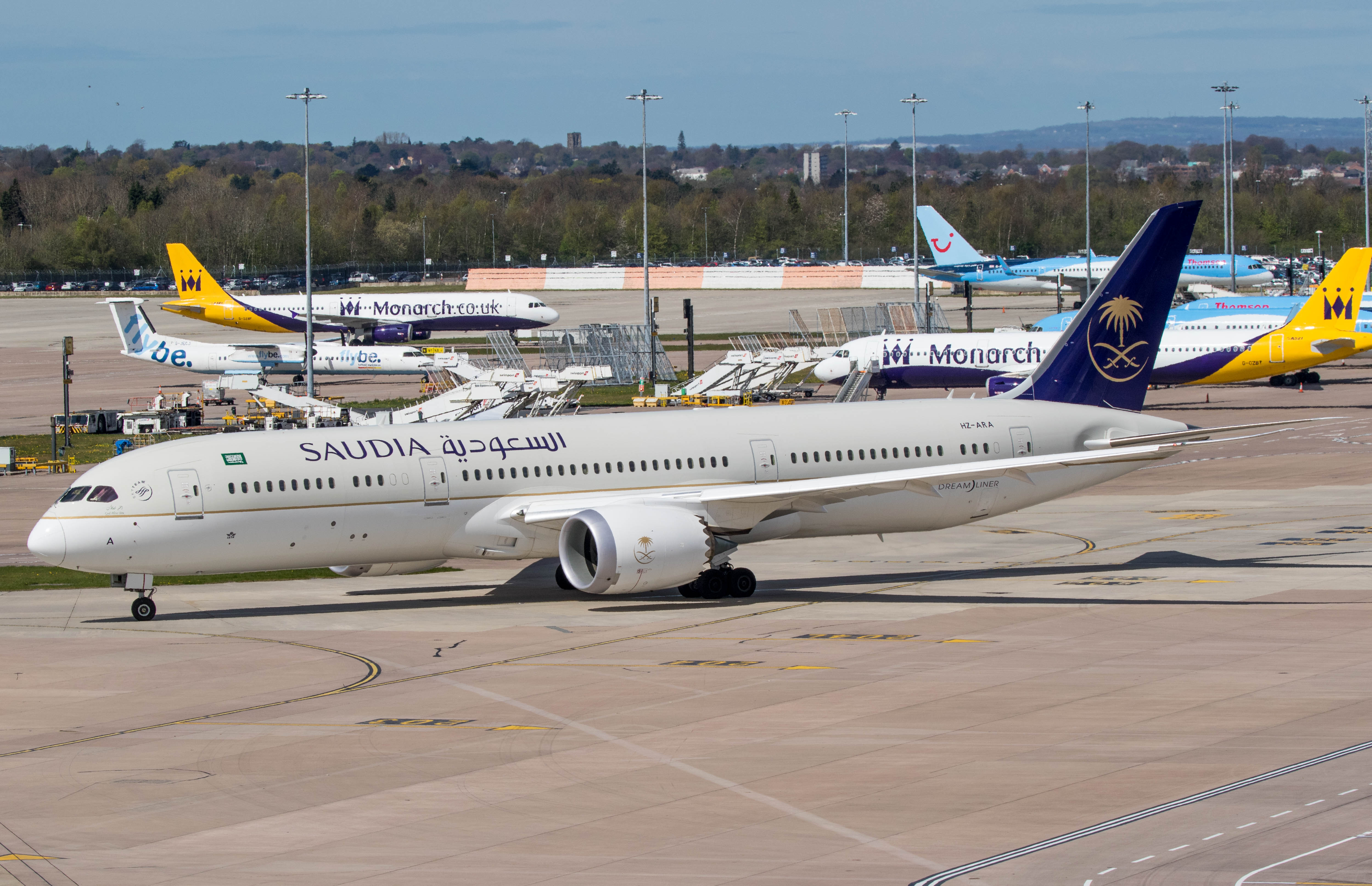 HZ-ARA Saudia B787 Dreamliner